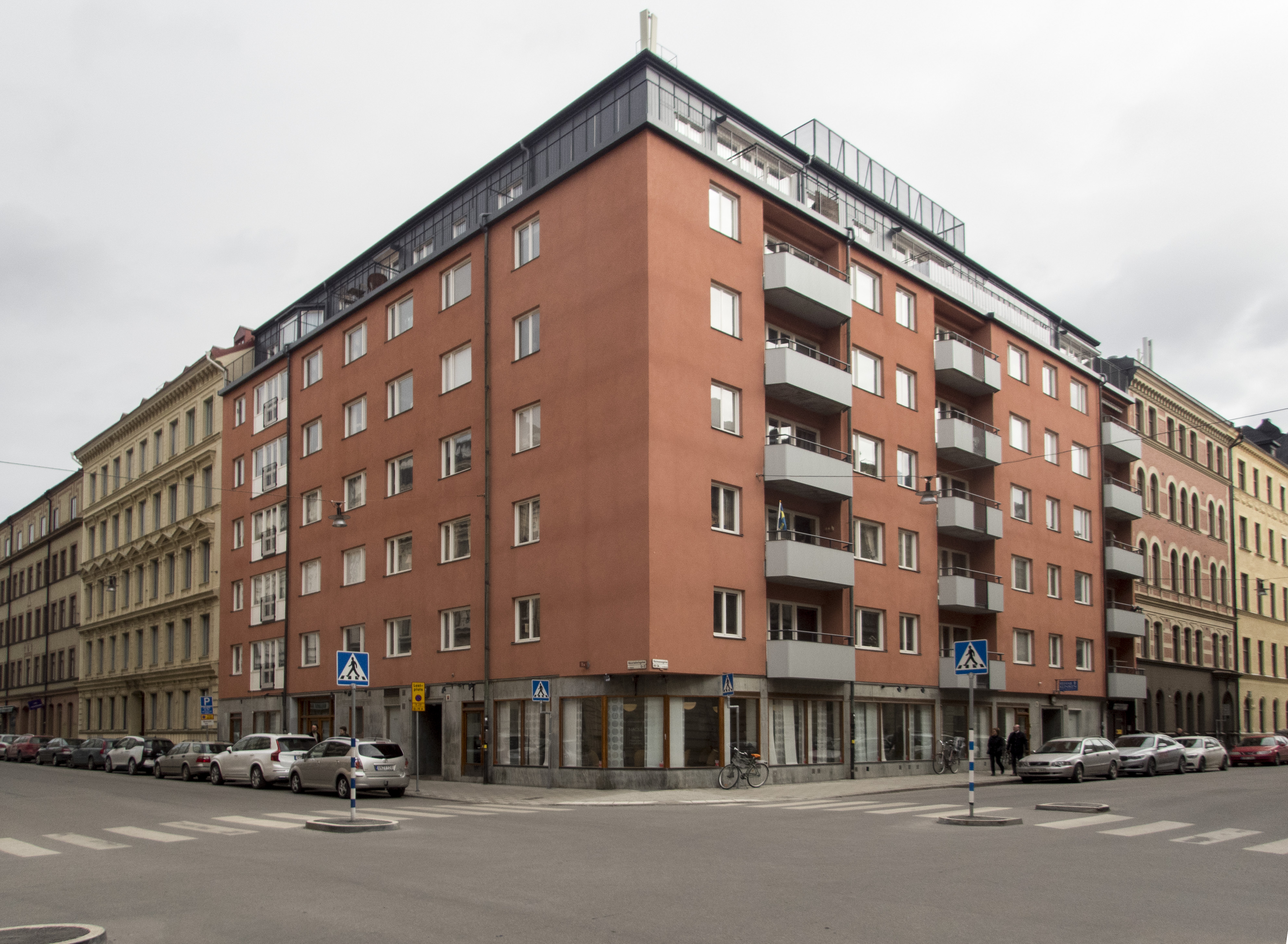 Kometen 3, Observatoriegatan 17, Västmannagatan 40 Stockholm Nybyggnadsår 1959 E. Mattson Byggnads AB (Byggherre) E. Mattsson (Byggmästare) Olle Zetterberg (Arkitekt)